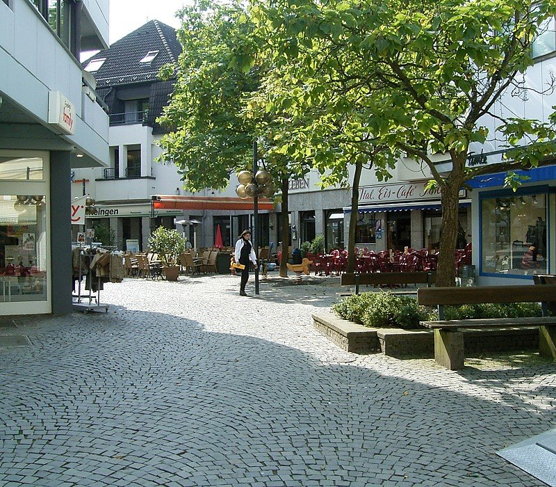 Plettenberg